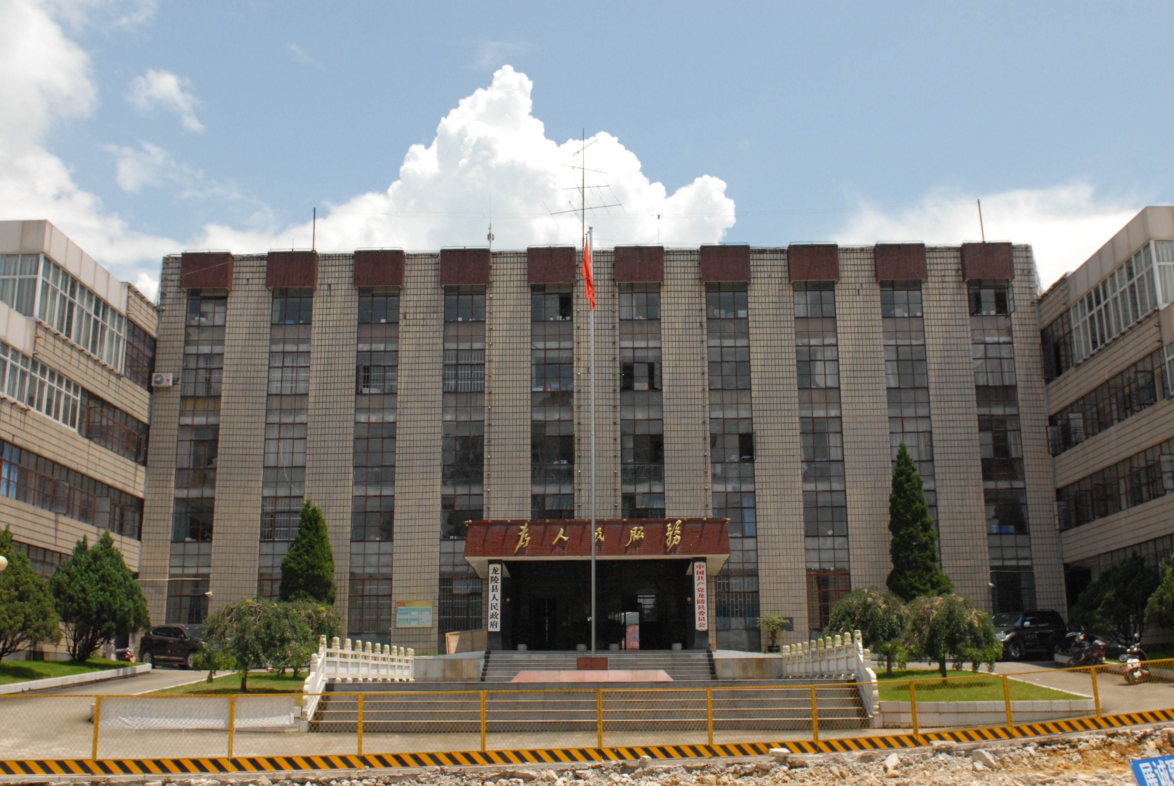 中文（中国大陆）: 龙陵县人民政府